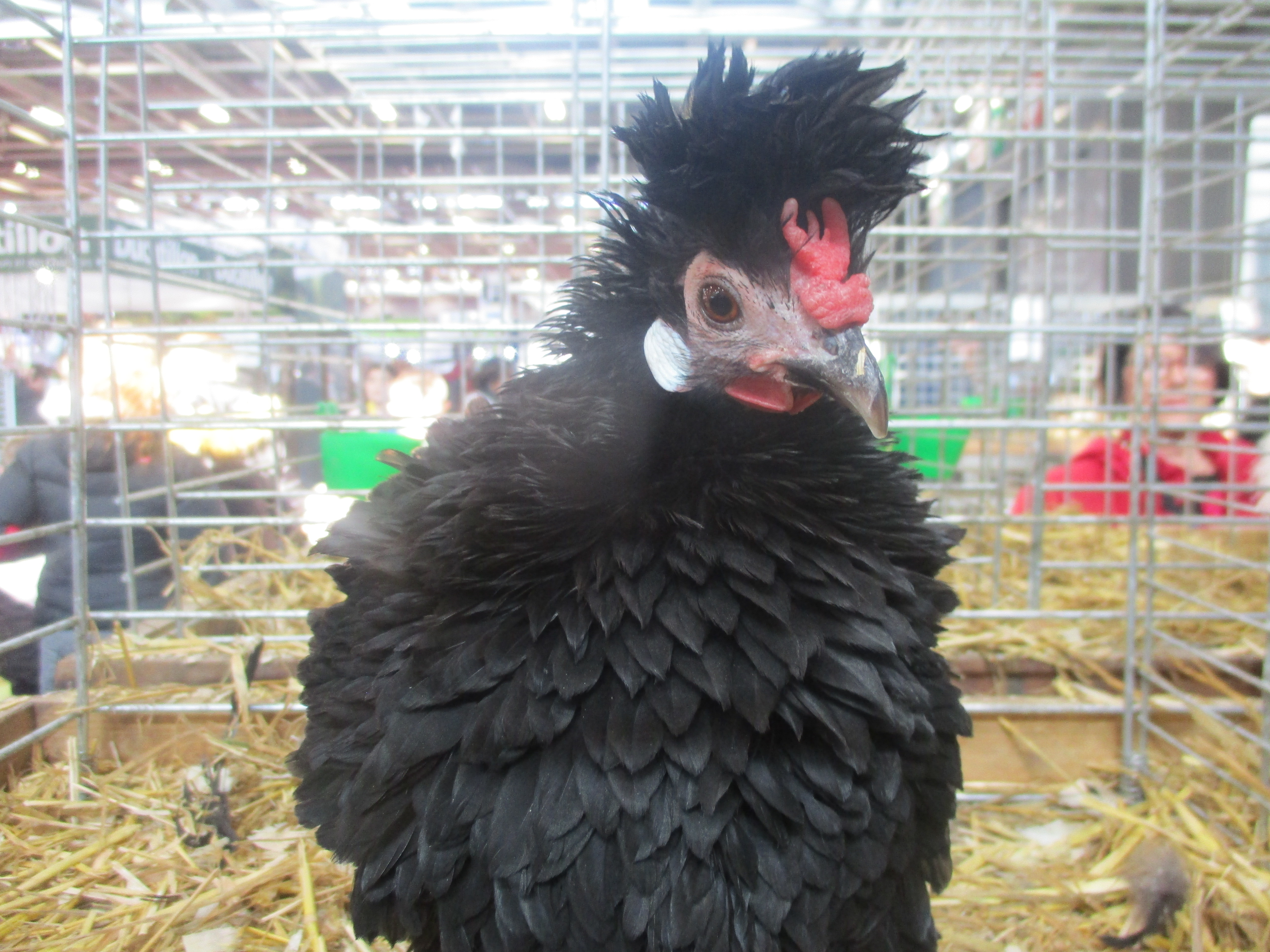 Salon de l'agriculture. Race lyonnaise.